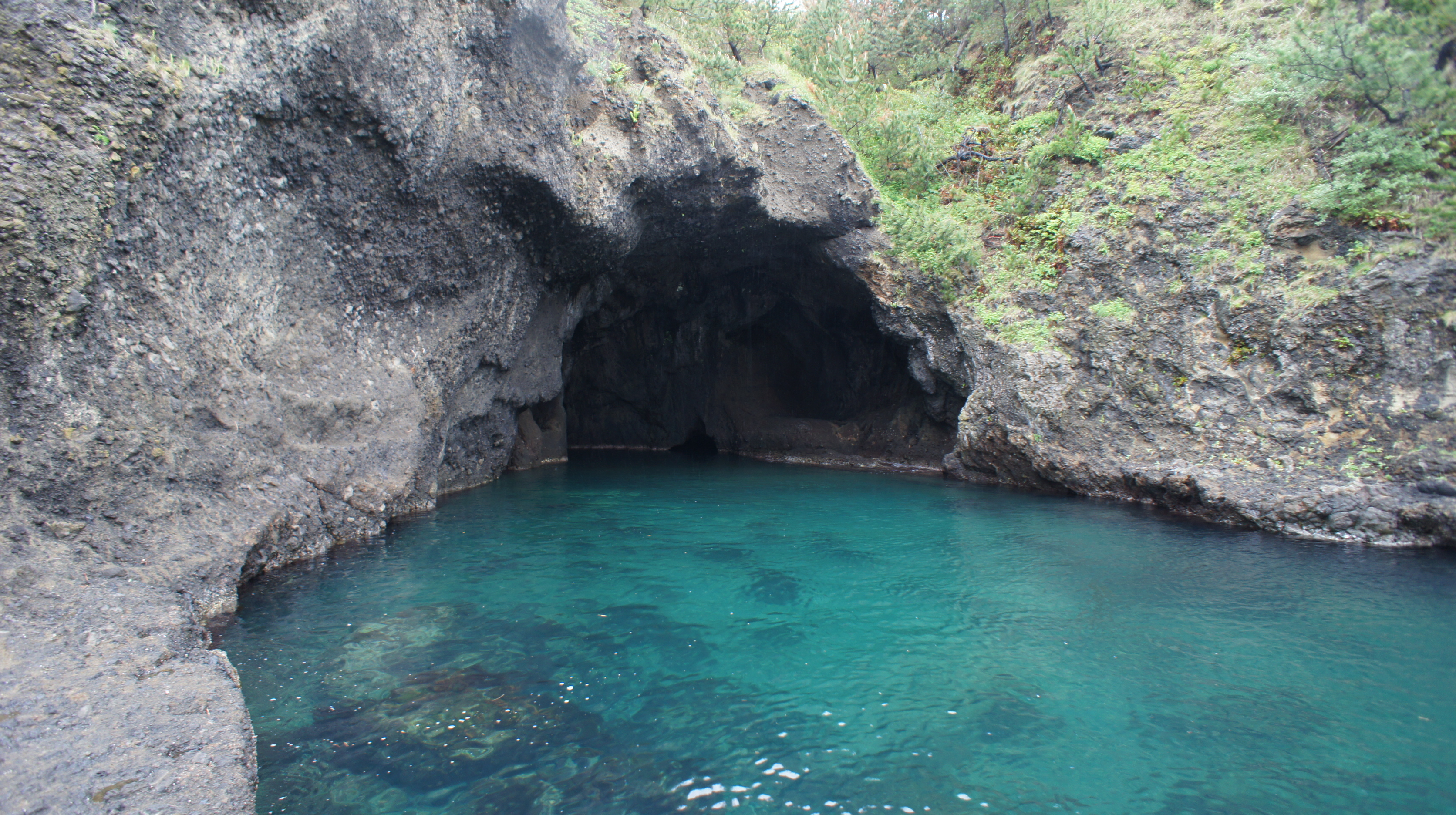 竜王洞 Cave